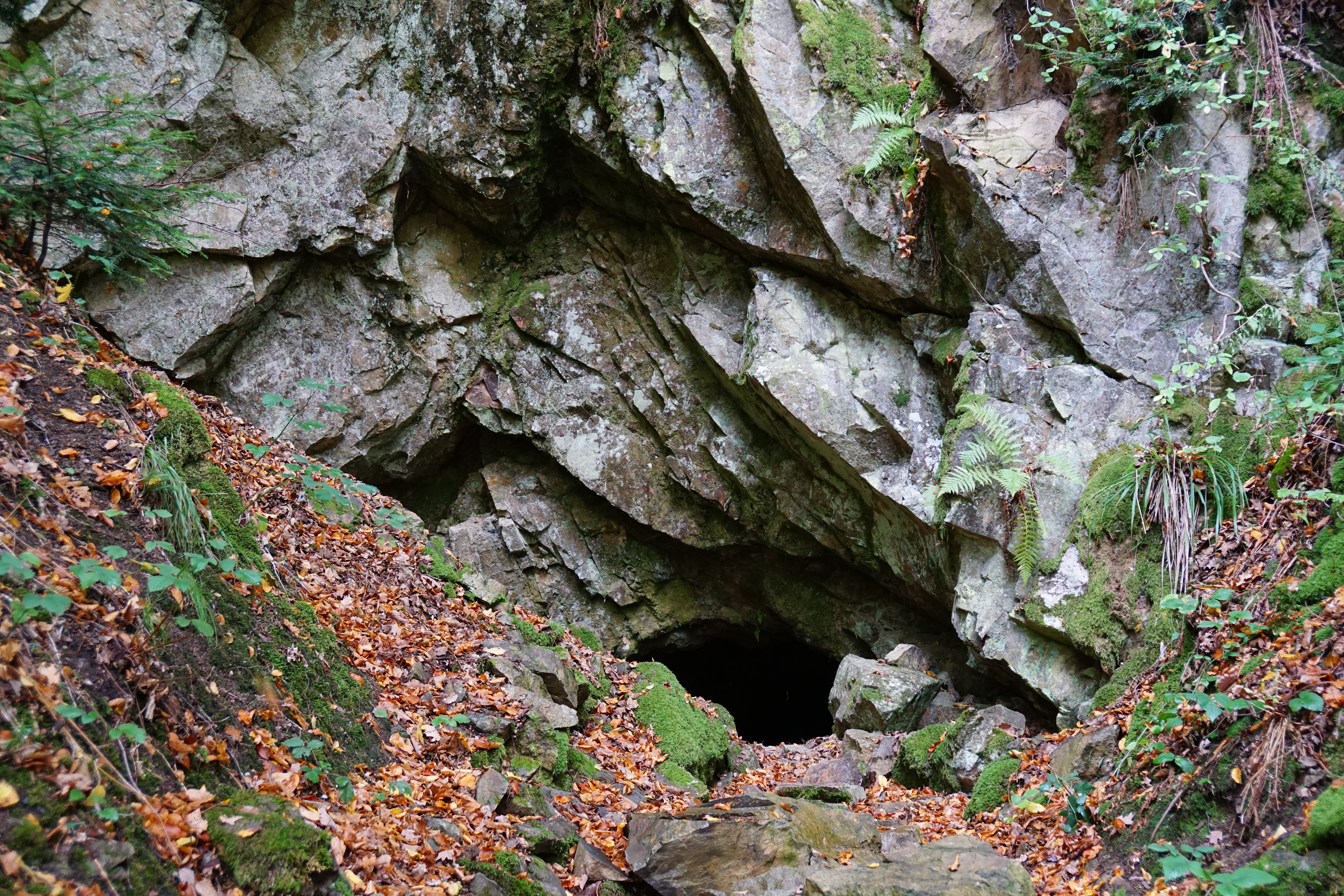 La mine de plomb du Laurier à Plancher-les-mines.